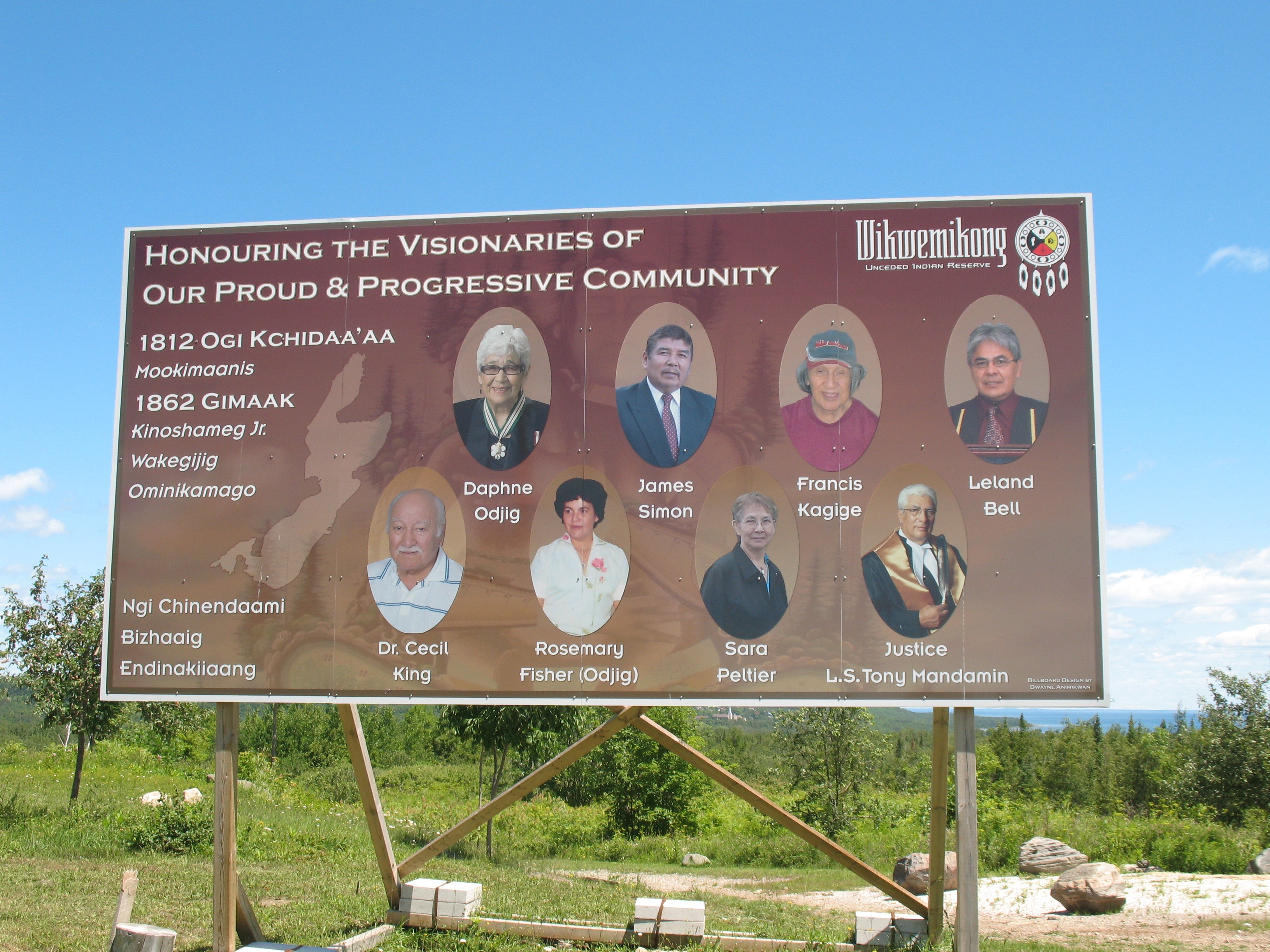 Gedenktafel am Ortseingang von Wikwemikong auf Manitoulin Island im kanadischen Ontario